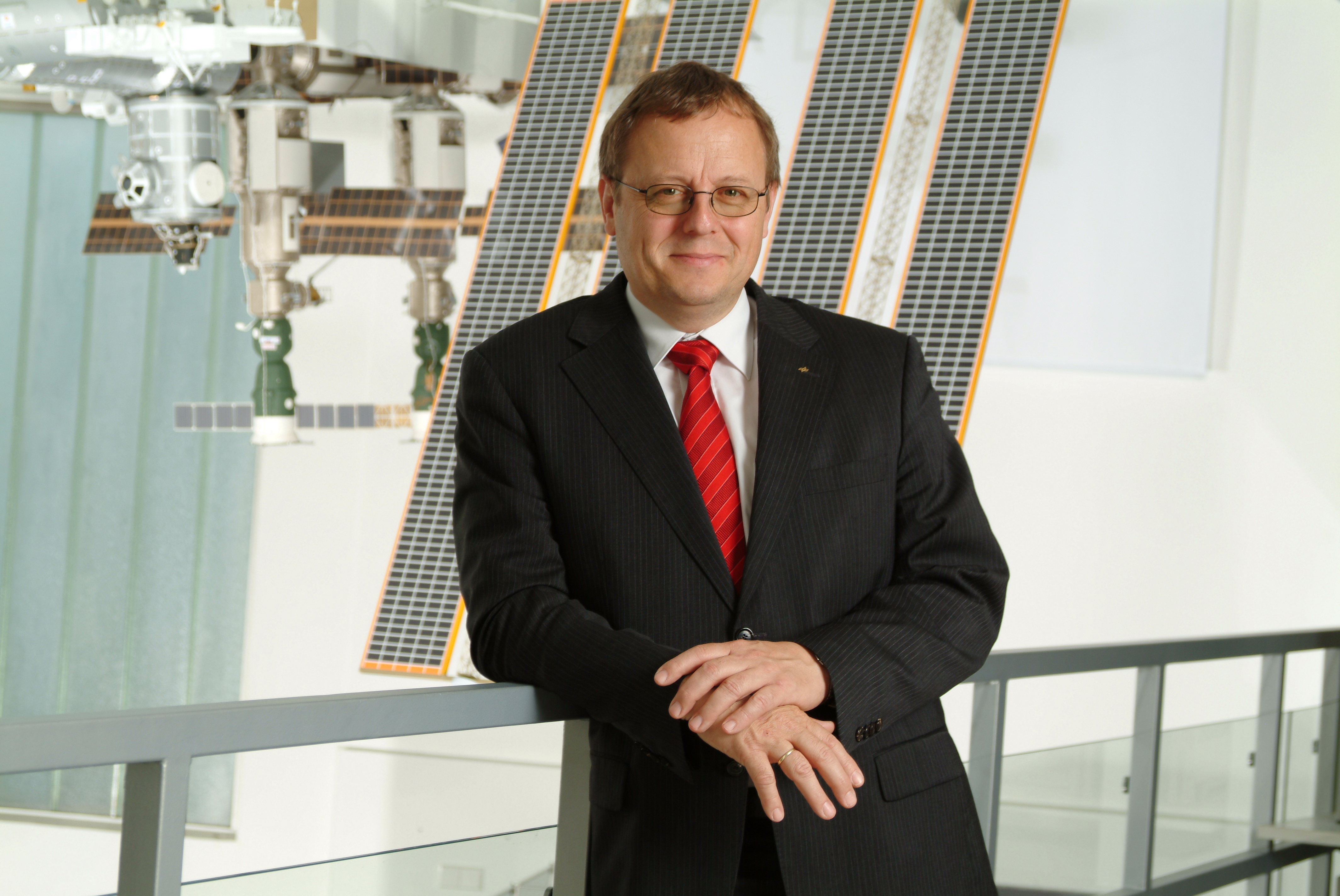 Prof. Johann-Dietrich Wörner, Vorstandsvorsitzender des DLR